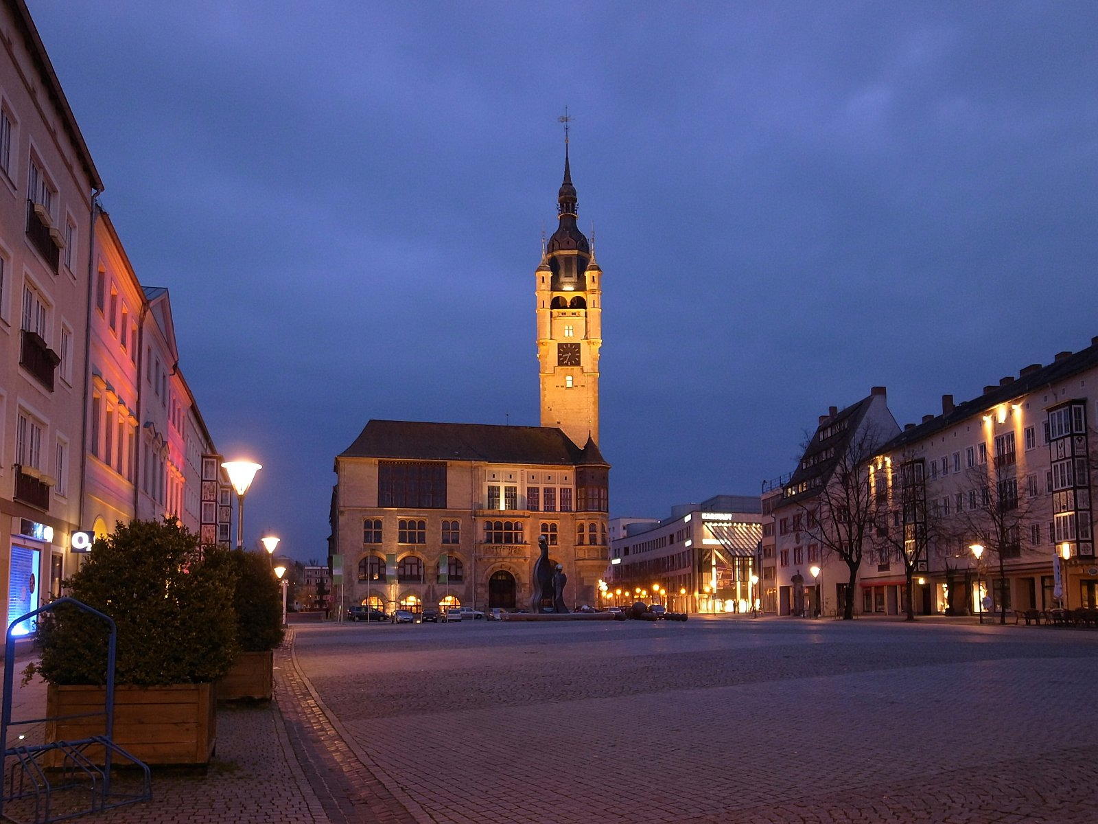 Dessau-Roßlau, Rathaus, Town Hall